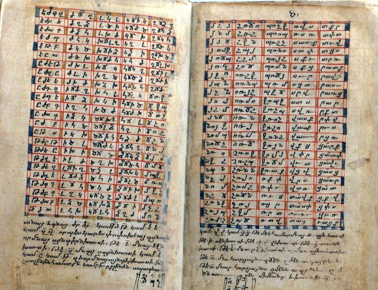 Անանիա Շիրակացի, Տիեզերագիտութիւն եւ տոմար (1283 թ., Անաւարզա, Երեւանի մատենադարան, ձեռ. թիւ 412)